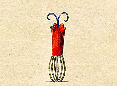 Ausschnitt (Klasse XIX) aus Ehrets Tafel "Methodus Plantarum Sexualis"